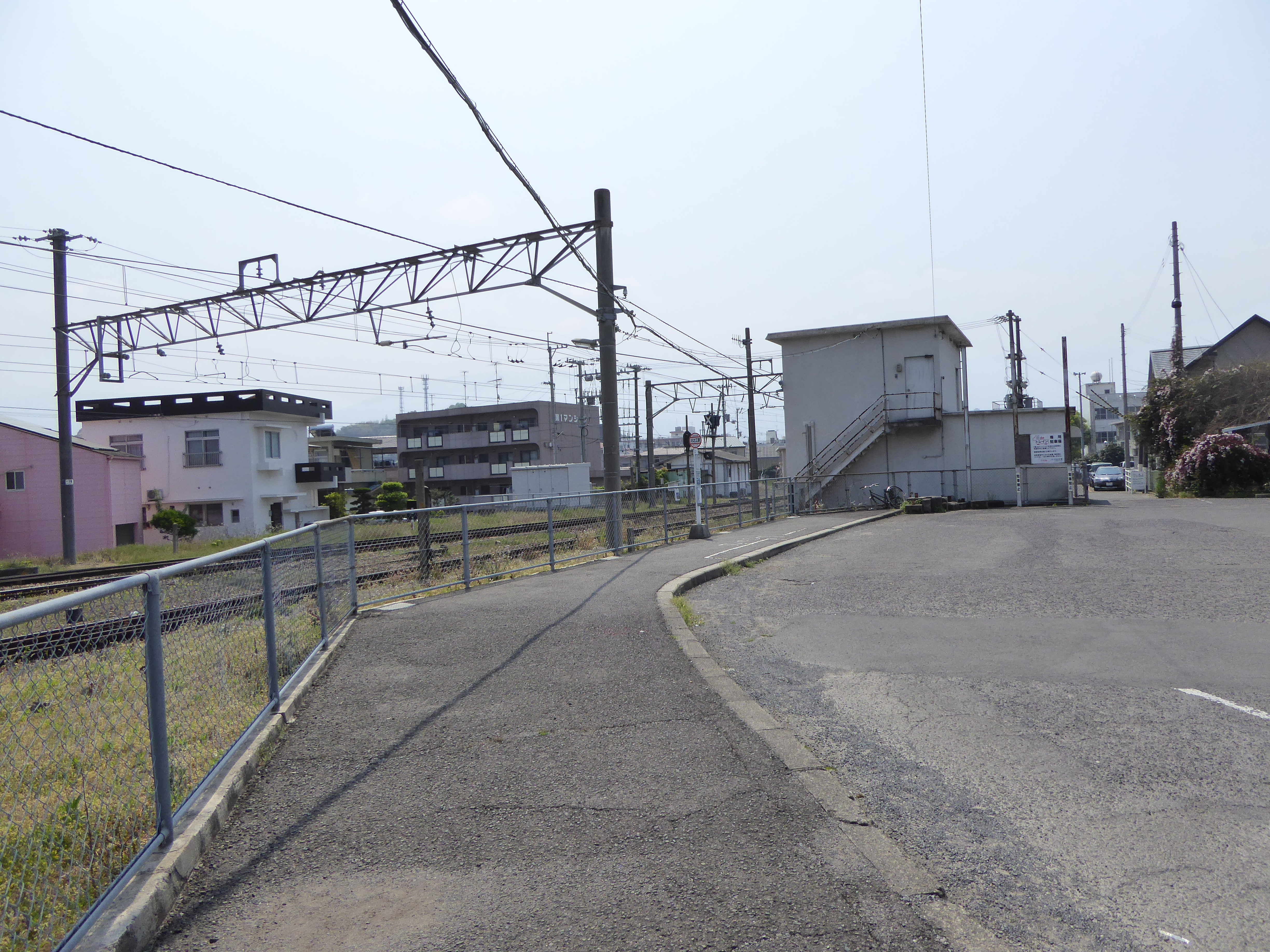 「川之江駅」停留所（2019年4月）